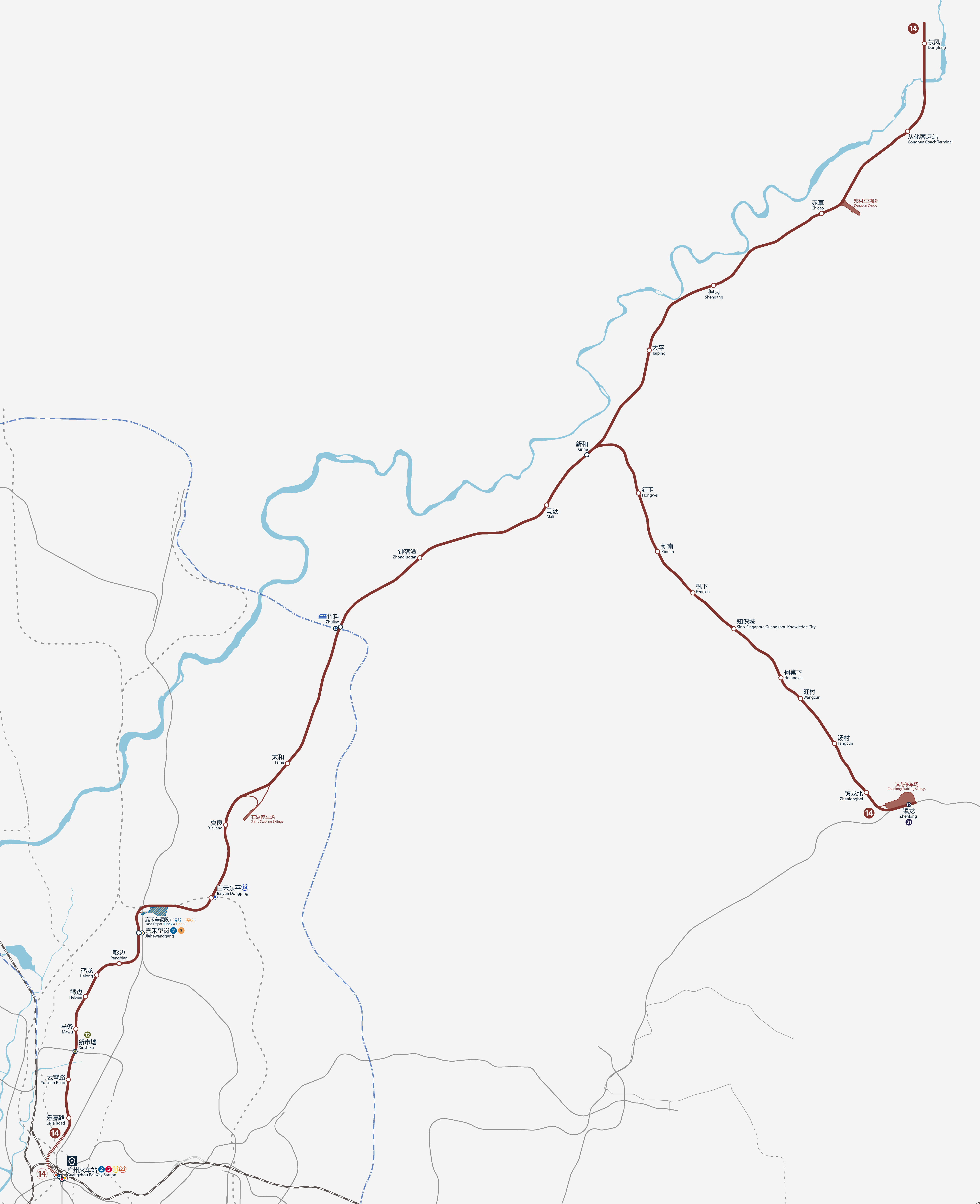 廣州地鐵14號線、知識城支線路線圖，按真實走向比例繪畫